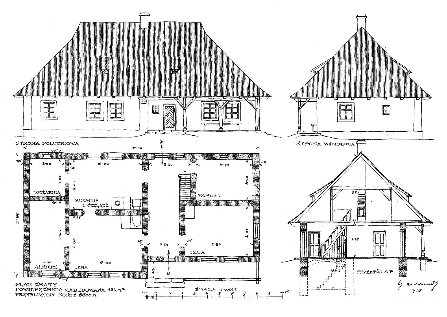 Типовий проект двокімнатної хати. Опублікований 1915 року в альбомі «Odbudowa polskiej wsi». Площа 188 м². Автор Зигмунт Гарлянд (1881—1942).